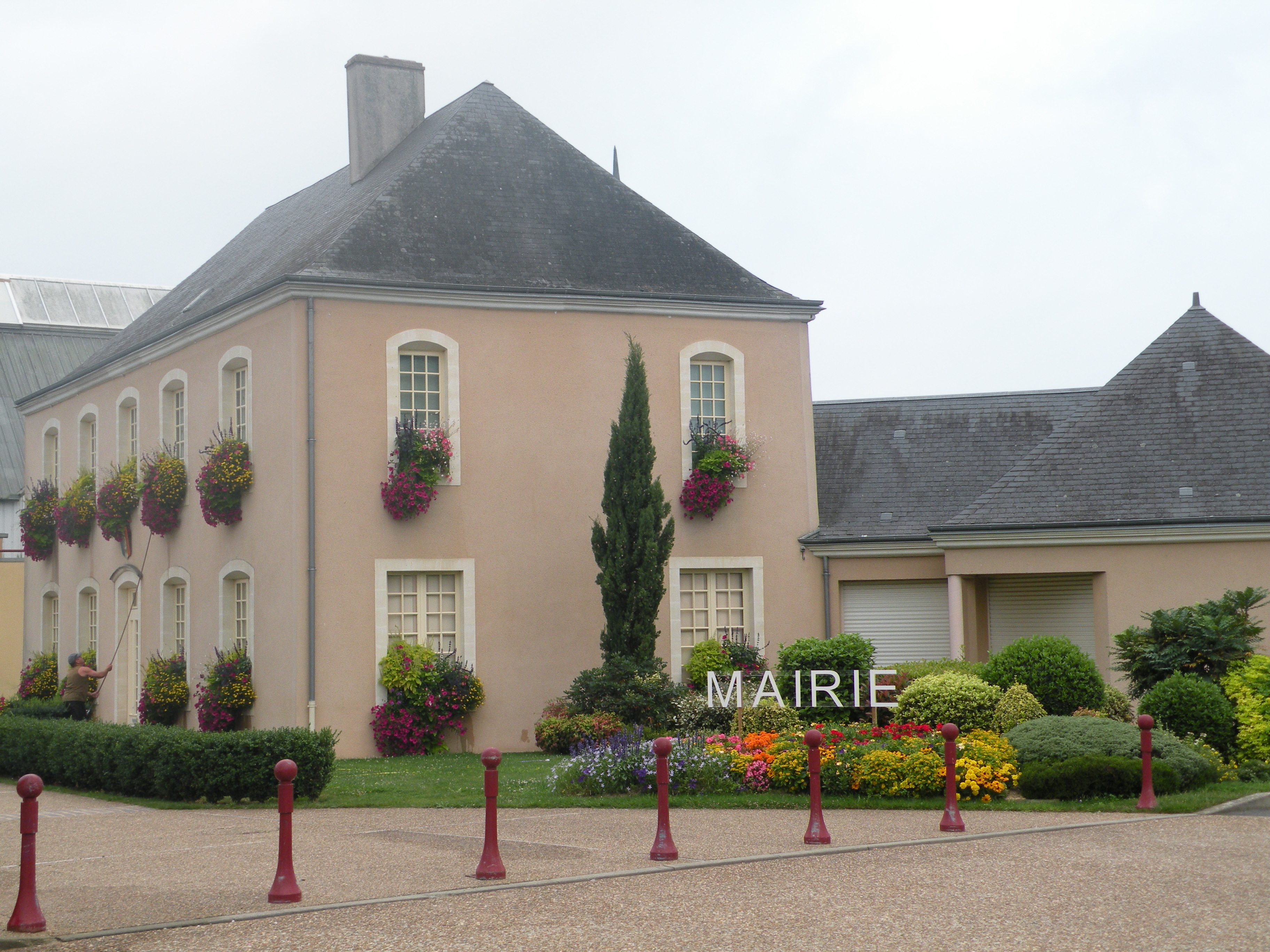 Mairie de Beaufay.